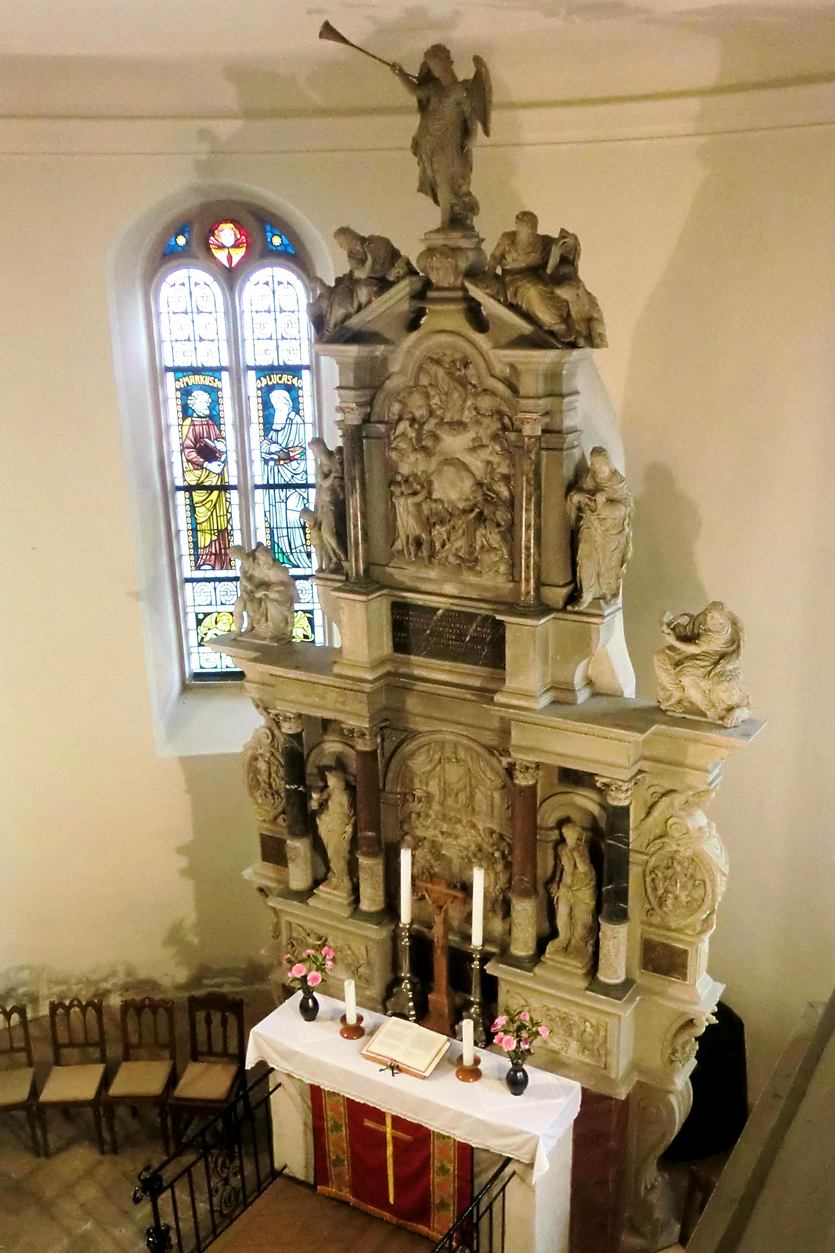 Kirche Borna (Gemeinde Liebschützberg), Altar des Nossenischülers Michael Walther. 1599 bis 1605: Sandsteinaltar, Säulen und Schrifttafeln aus Marmor, die Säulenbasis aus Serpentin